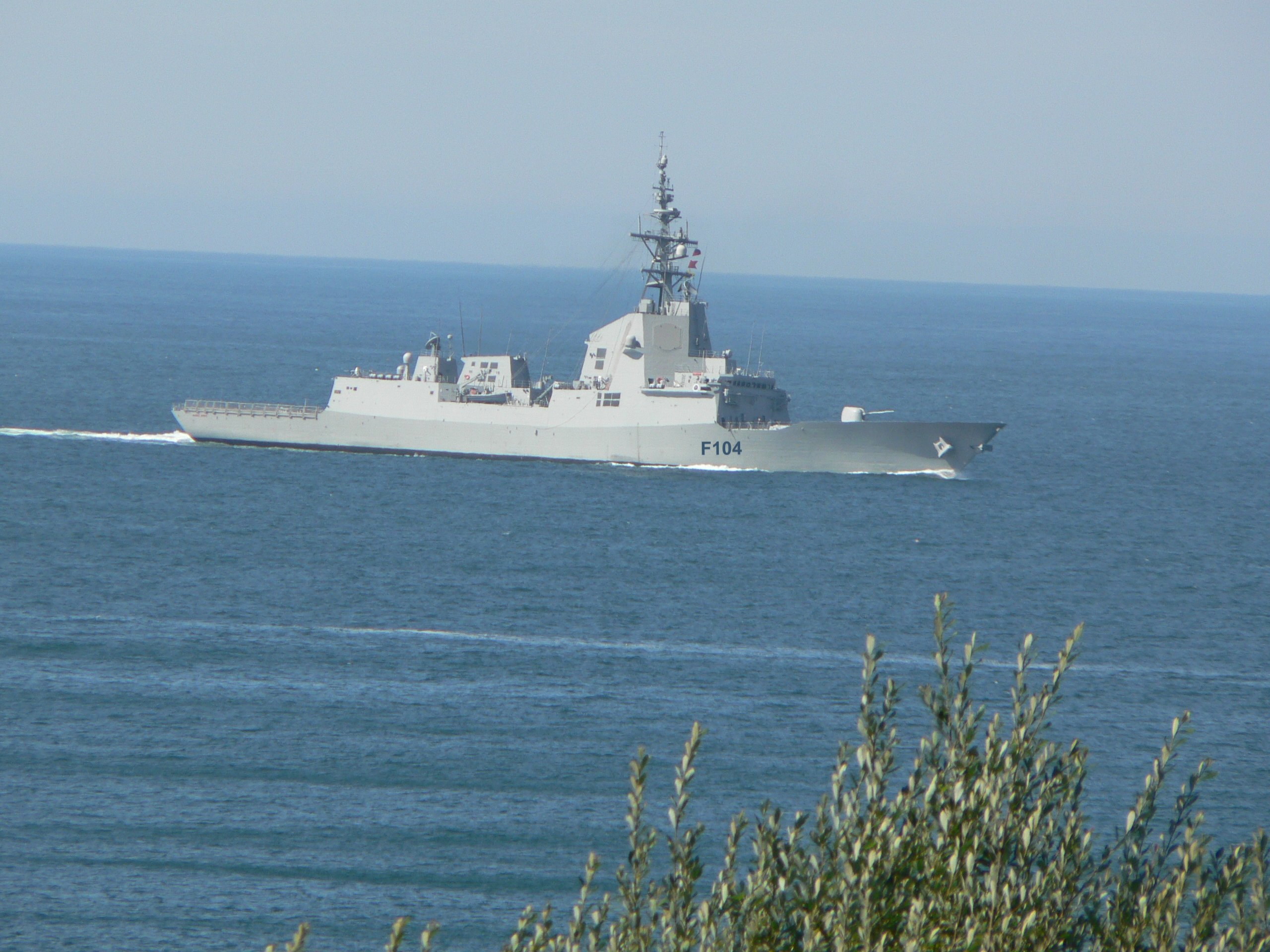 Fragata Méndez Núñez (F-104) en probas pola ria de Ares